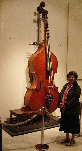 Octobass - late XIXth century - Paris, musée de la musique